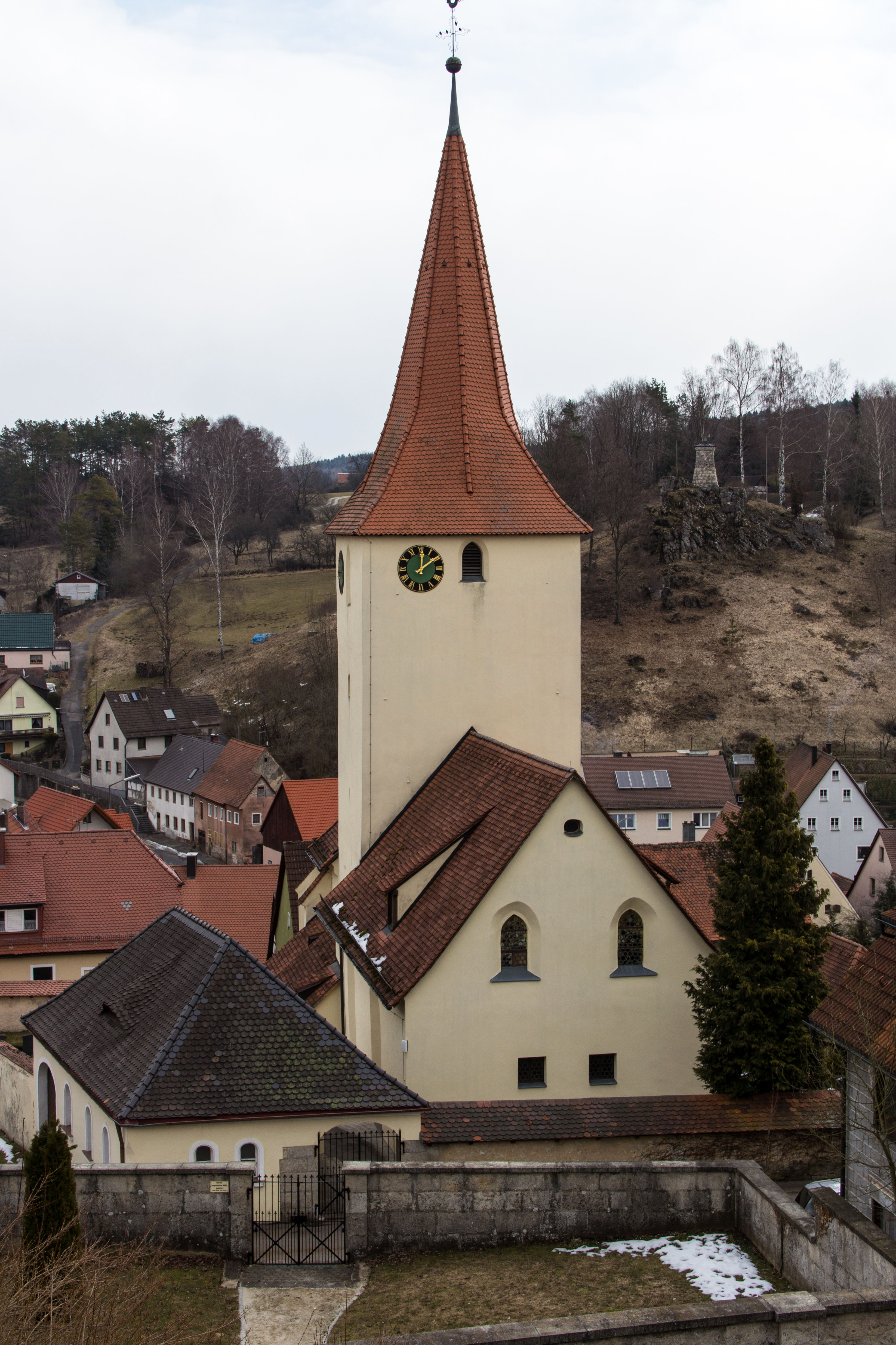 Sankt Bartholomäus, Alfeld